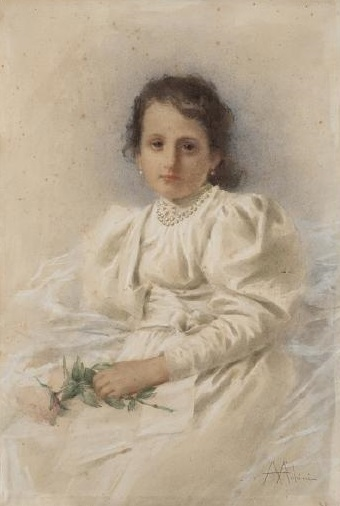 "Fanciulla con rose in mano", acquerello, 47x31 cm, firmato